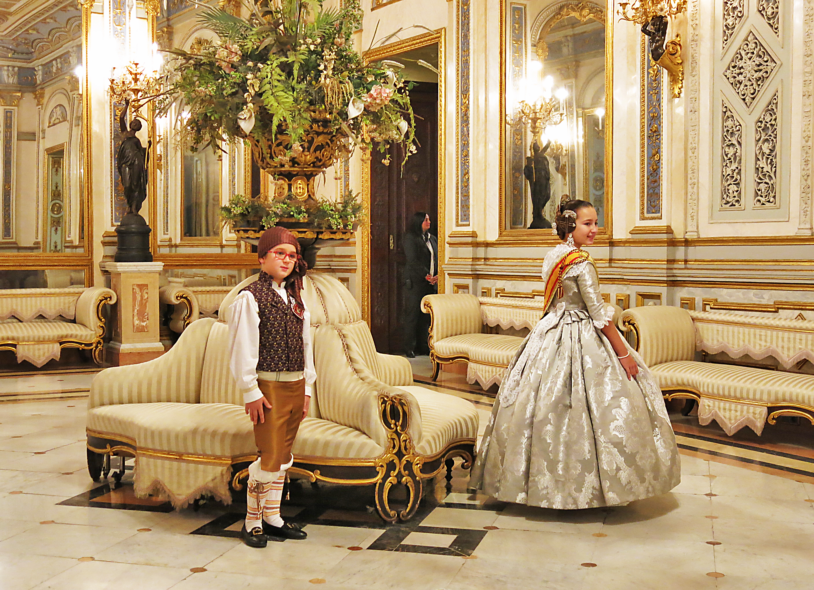 Els fallers majors infantils al Palau del Marqués de Dosaigües (València) This is a photography of a Folklore festival in Spain (Wikidata id Q1143768).